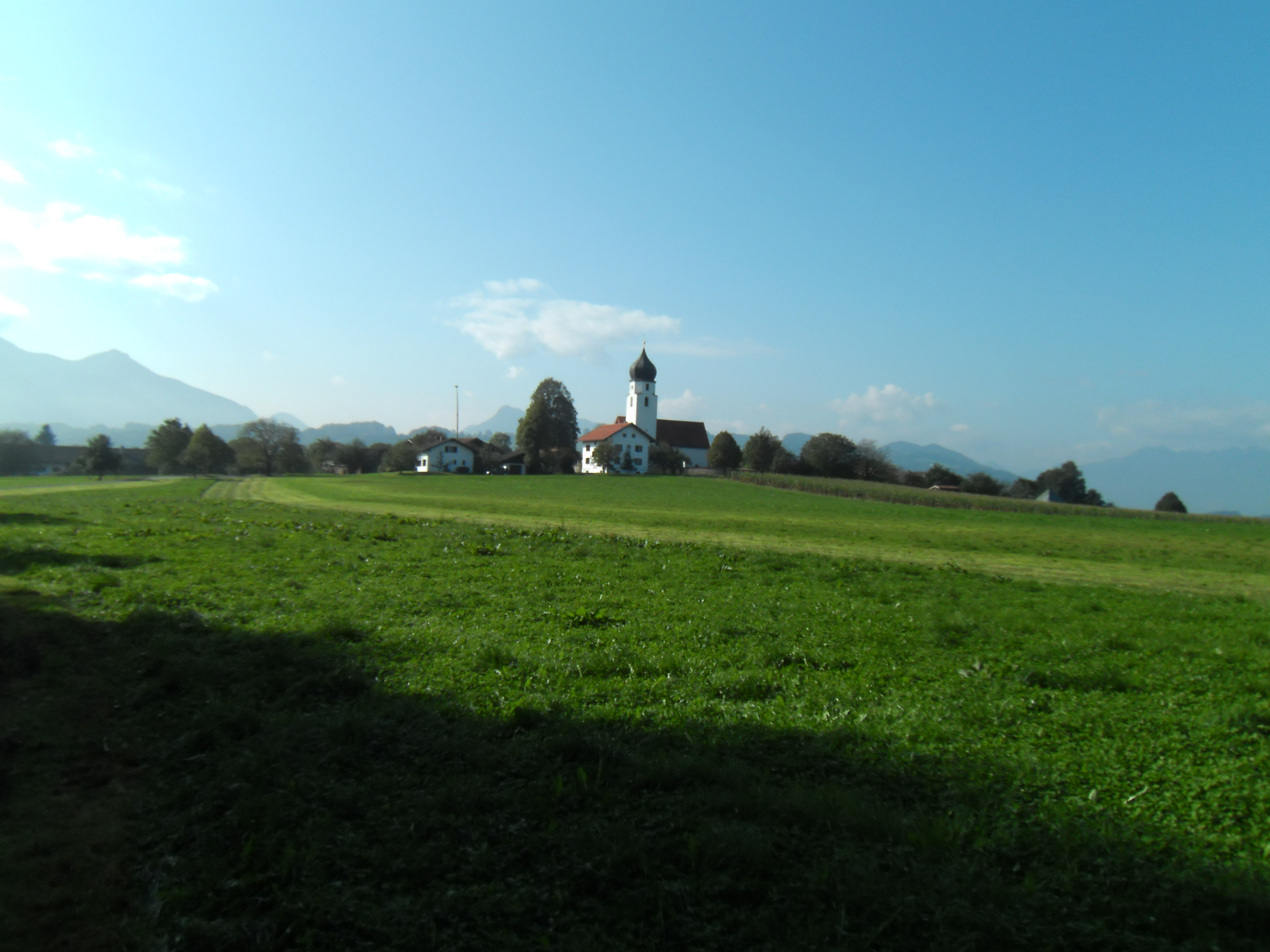 Rohrdorf (am Inn), Landkreis Rosenheim, Oberbayern. Das Bild zeigt den auf einem Hügel gelegenen Gemeindeteil Höhenmoos.